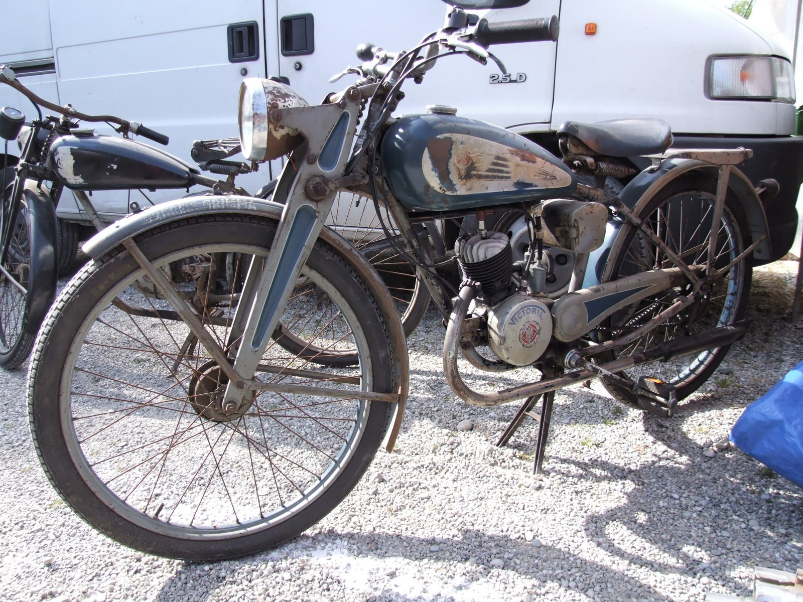 Quelle: selbst fotografiert, 04/2007 Fotograf: Späth Chr.